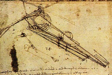 рисунок Леонардо да Винчи - Лежащий ORNITOTTERO